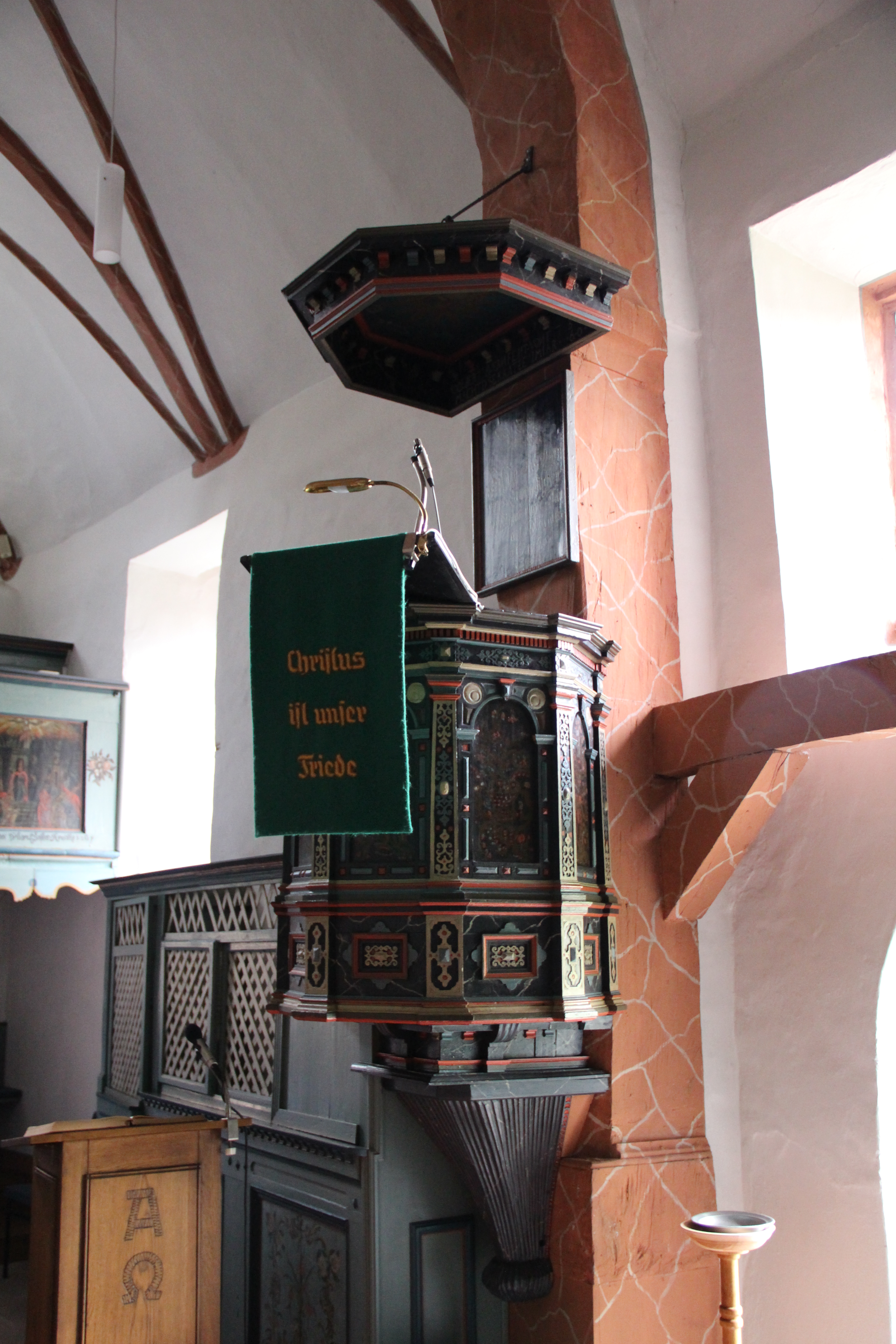 Ev Kirche Kirchvers (Lohra)